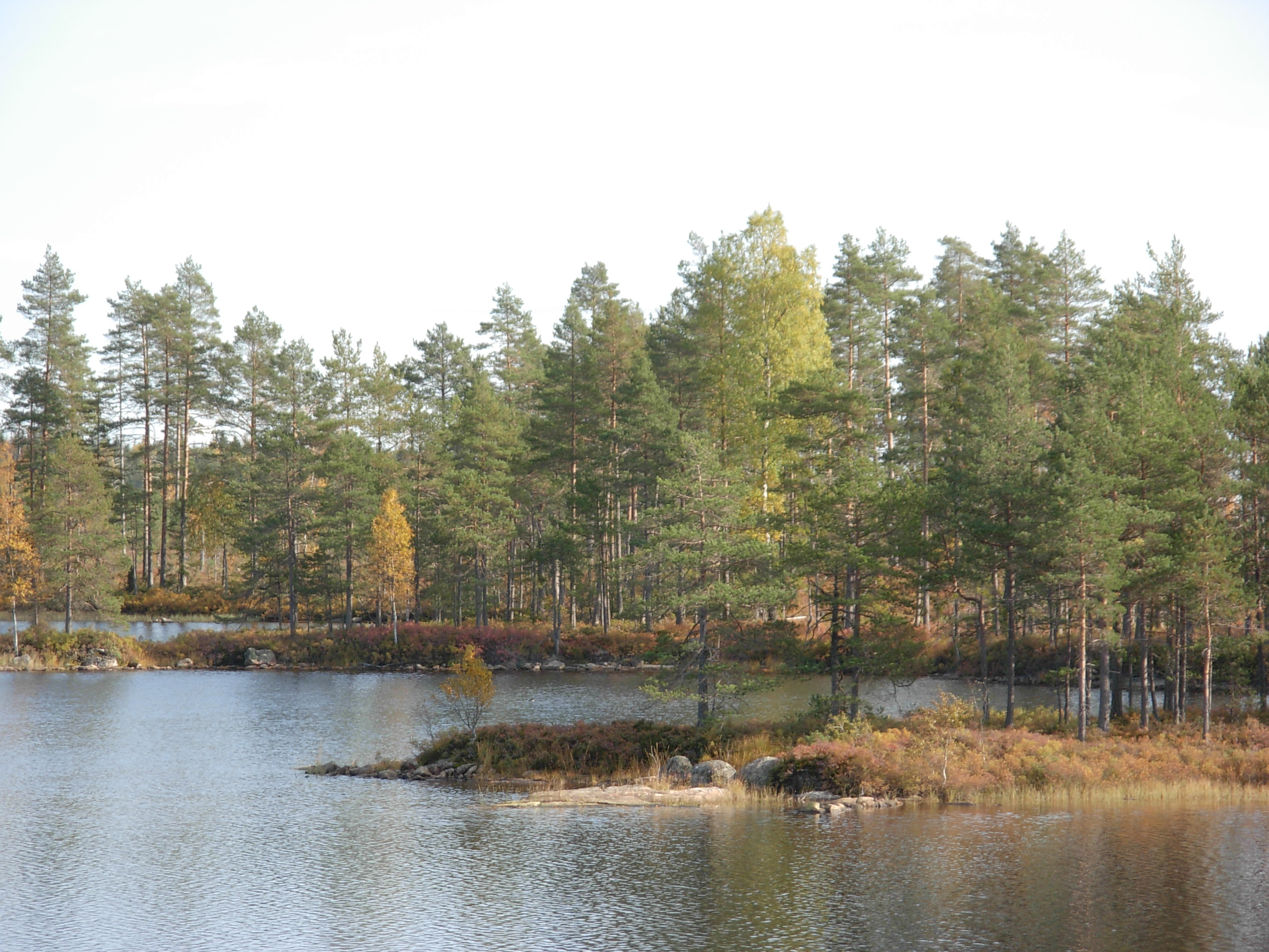 Mosjökälla är en skogssjö i Nora kommun.